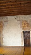 San Pietro di Morubio: Villa Verità, particolare della loggia di Villa Verità, primo piano.